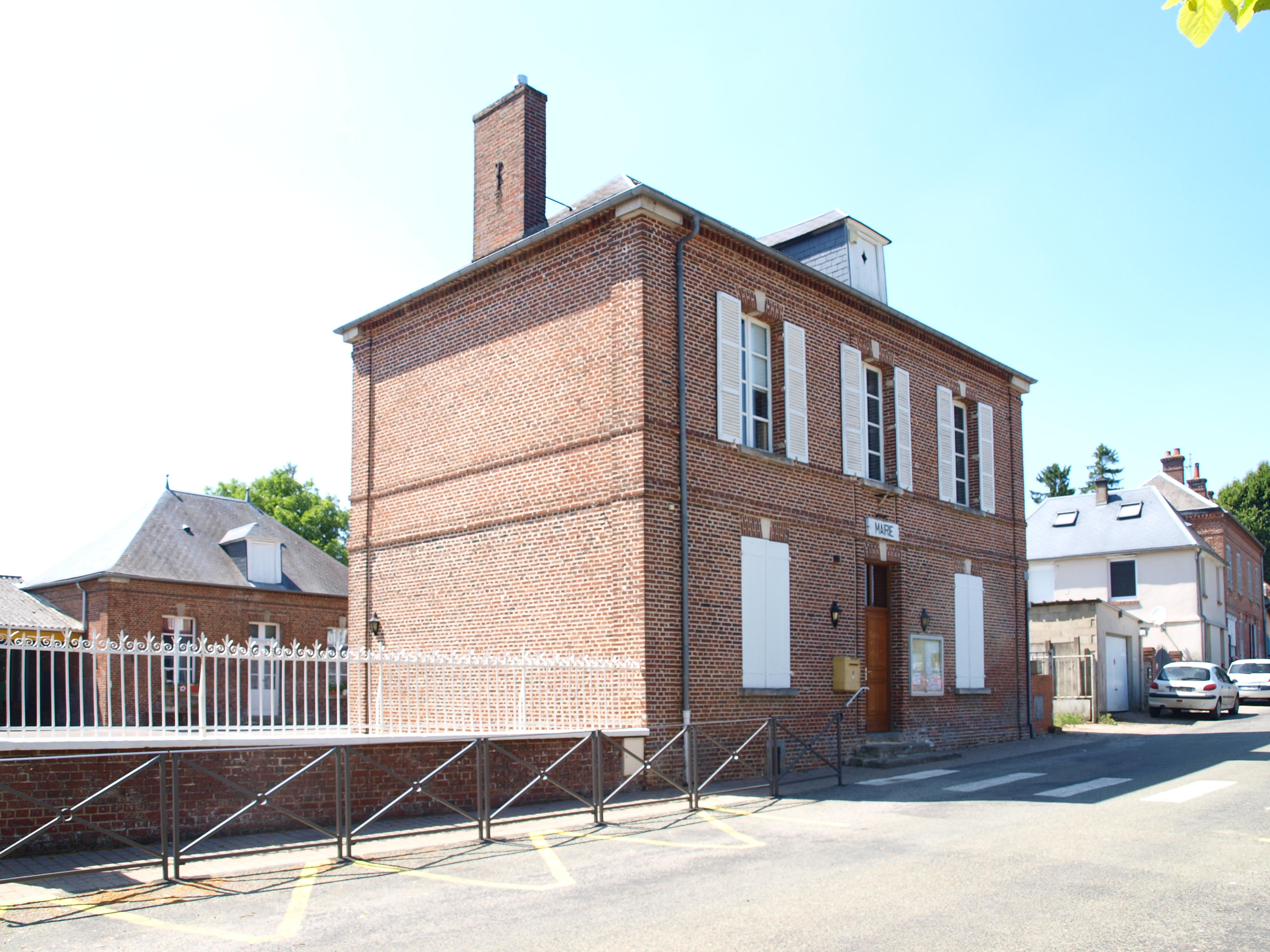 Fontaine-Lavaganne (Oise, France) ; mairie.